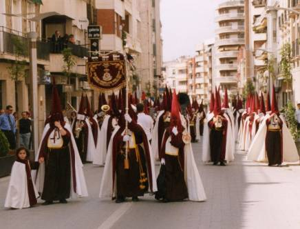 Banda de cabecera del Rescate Banda de cabecera del Rescate en pasacalles tocando "Centuria Romana"